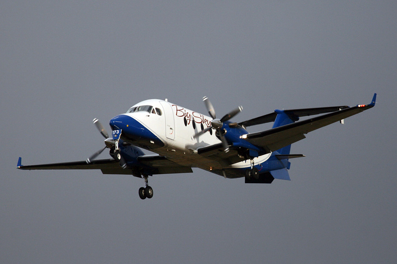 Big Sky Airlines Beech 1900D